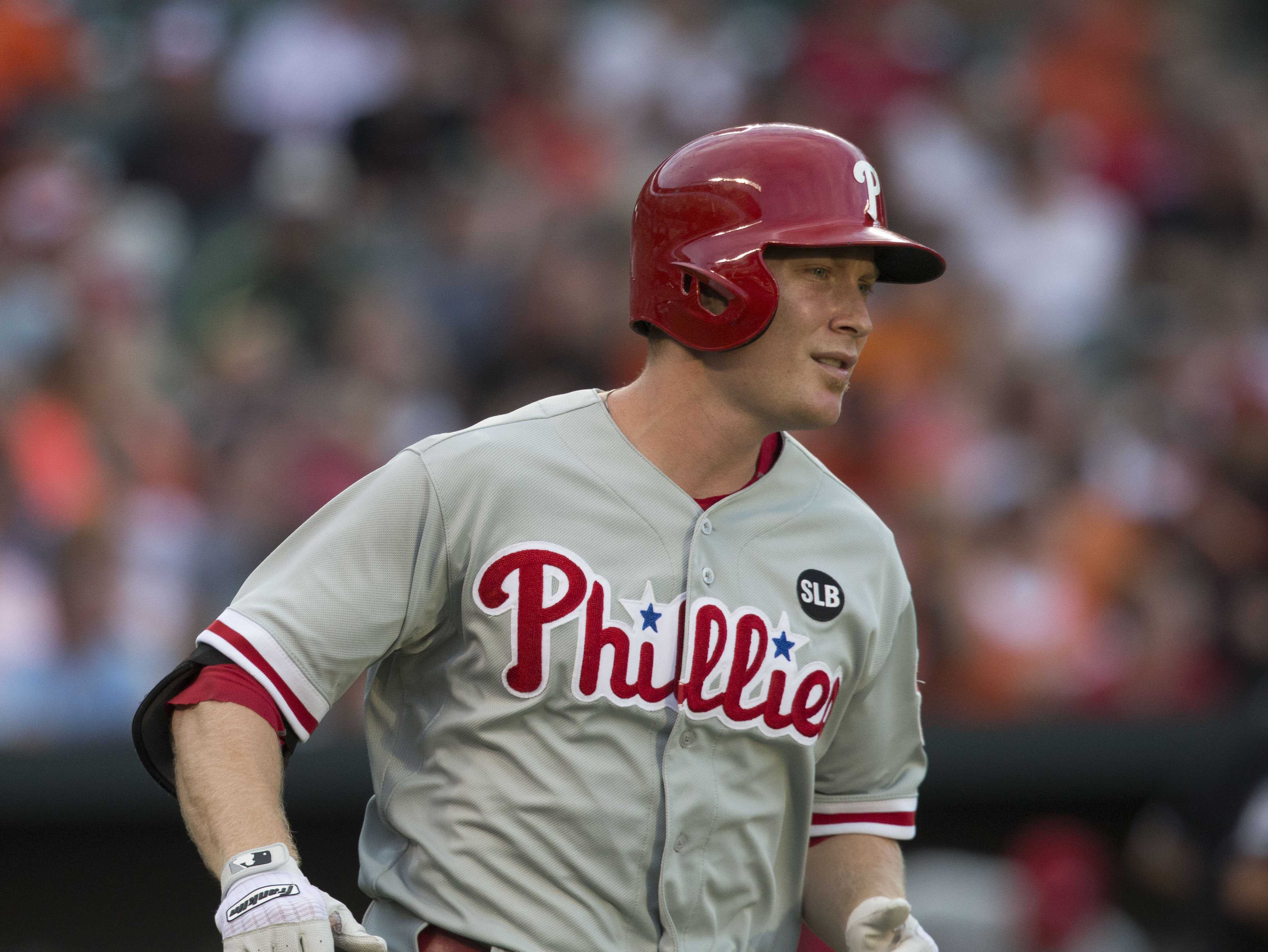 Phillies at Orioles 6/16/15